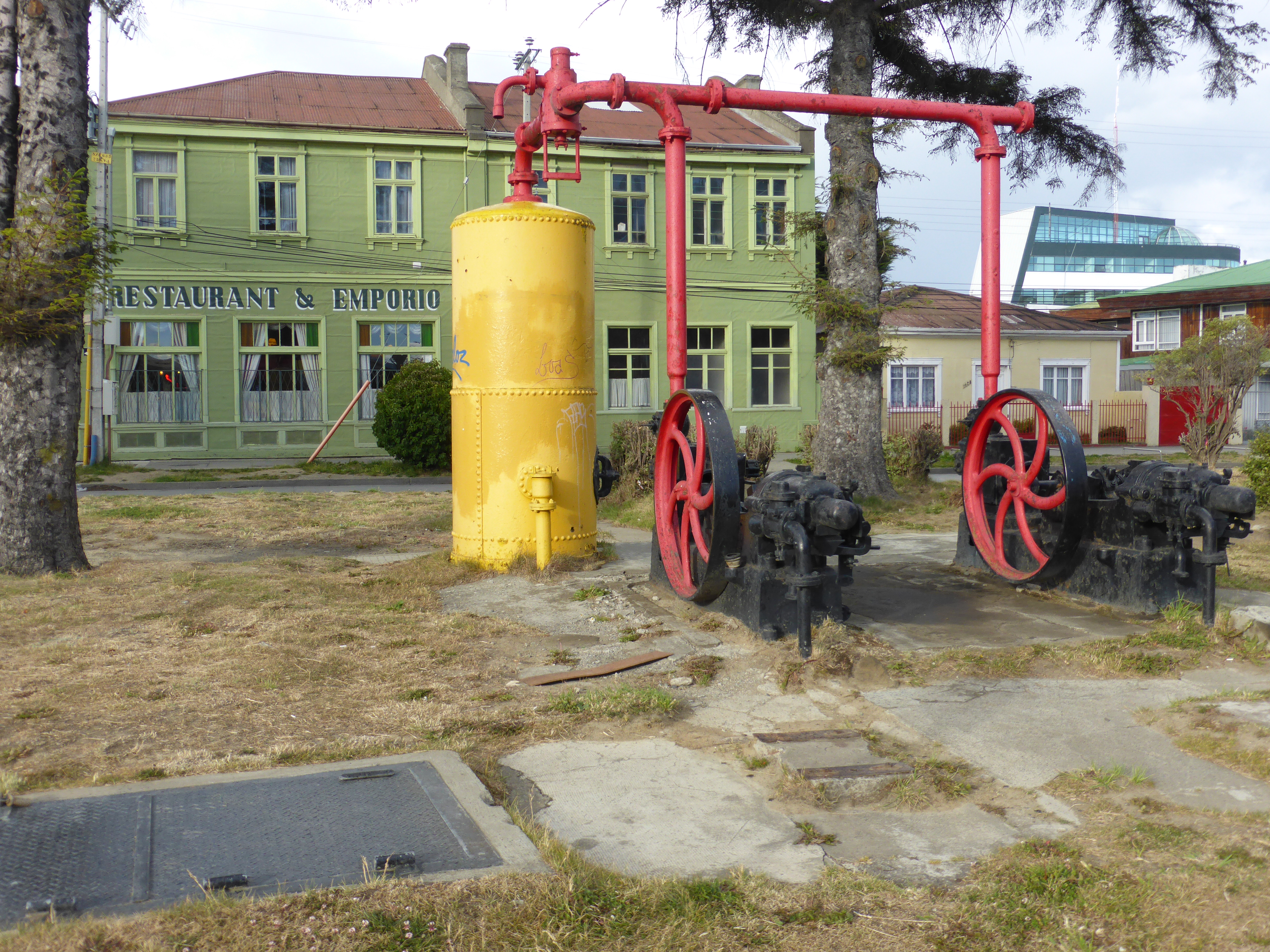 En Avenida Cristóbal Colón, a la altura de la calle Bernardo O'Higgins, se encuentra maquinaria antigua y el inmueble del actual "Restaurant & Emporio Okusa", que en fotografías antiguas se ve que era sede de la "Tienda Las Novedades". Esta casona fue construida en el año 1890.